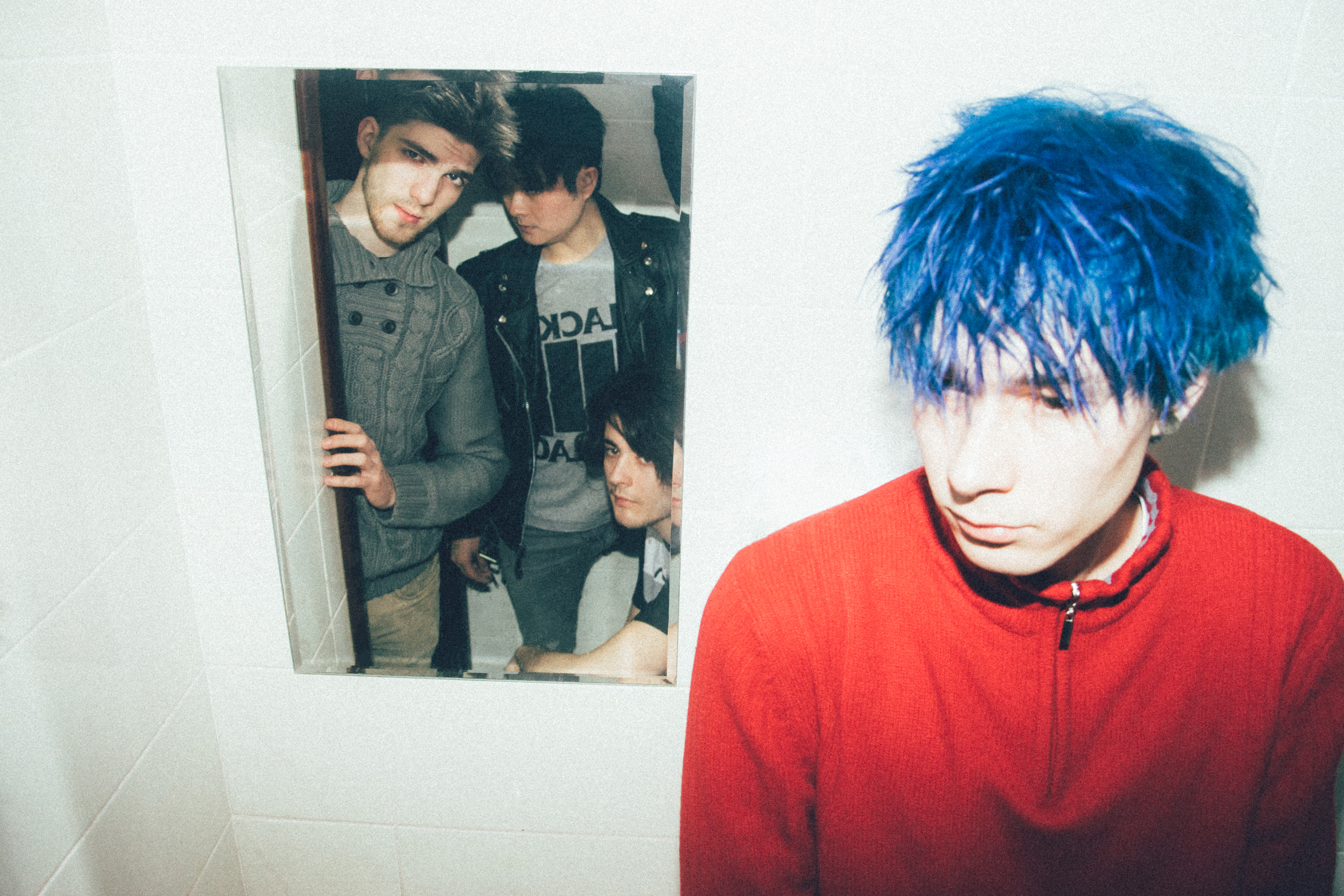 Слева направо: Влад Чернин, Владлен Шин, Руслан Тихонов, Вадим Тихонов